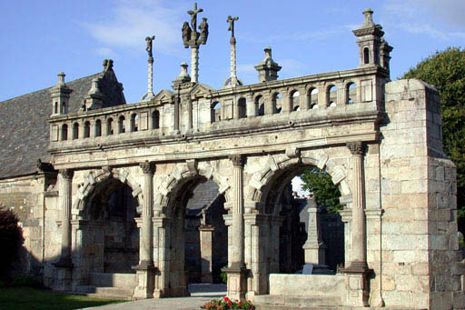 Porzh-bered Sizun.